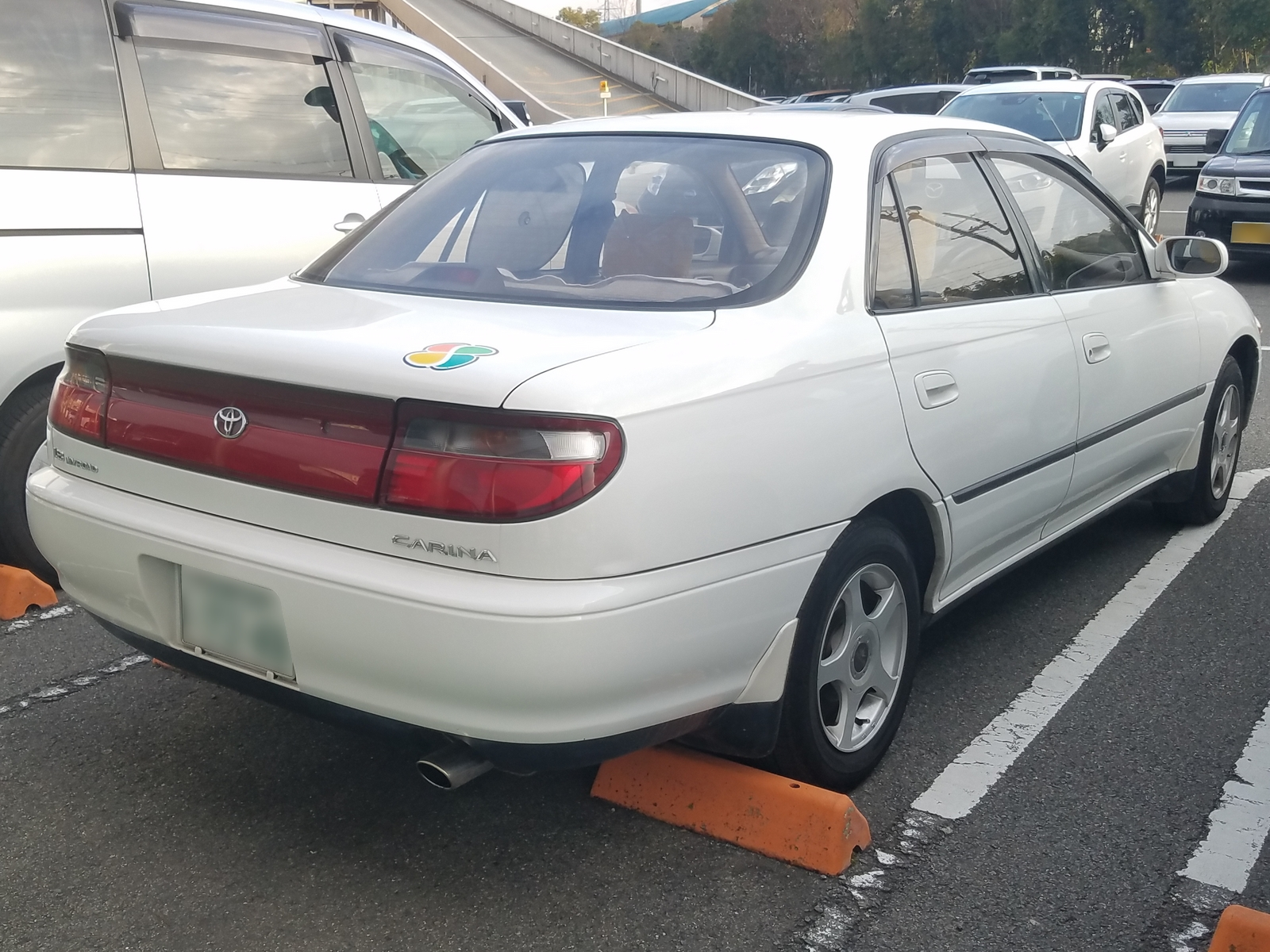 カリーナ 1.8マイロード（前期型）